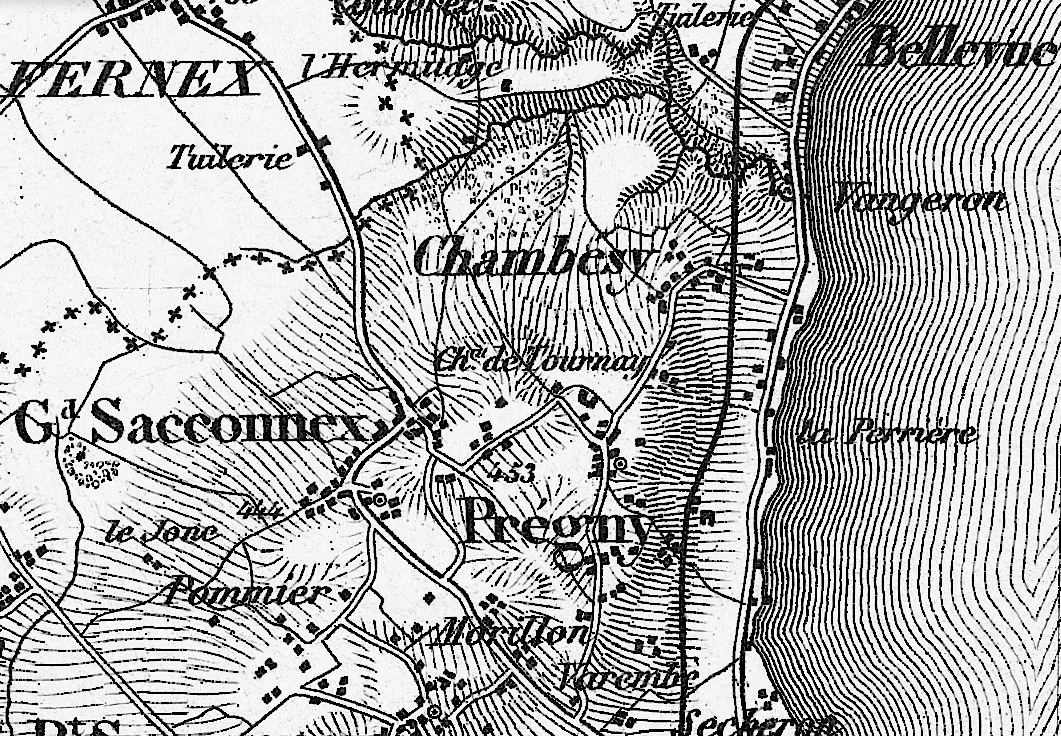 Extrait de la carte Dufour de 1855, commune de Pregny-Chambésy.